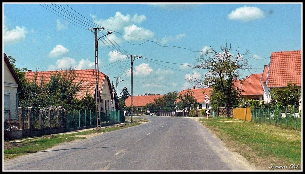 Gulács, Hungary